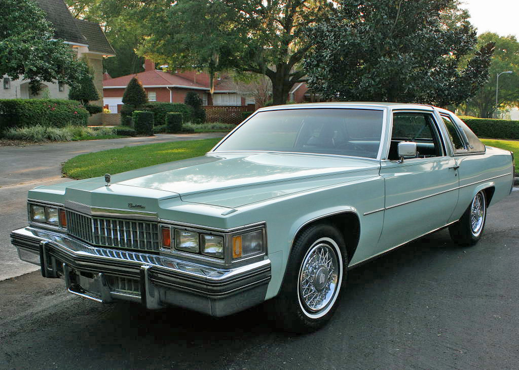 1978 Cadillac Coupe DeVille